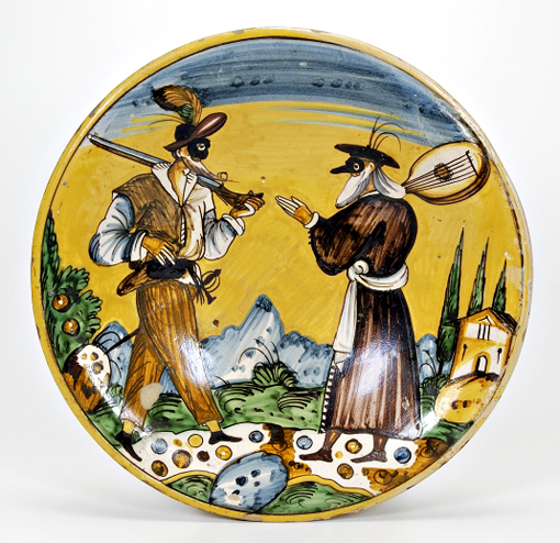 Piatto detto "Arlecchino". Montelupo XVII secolo